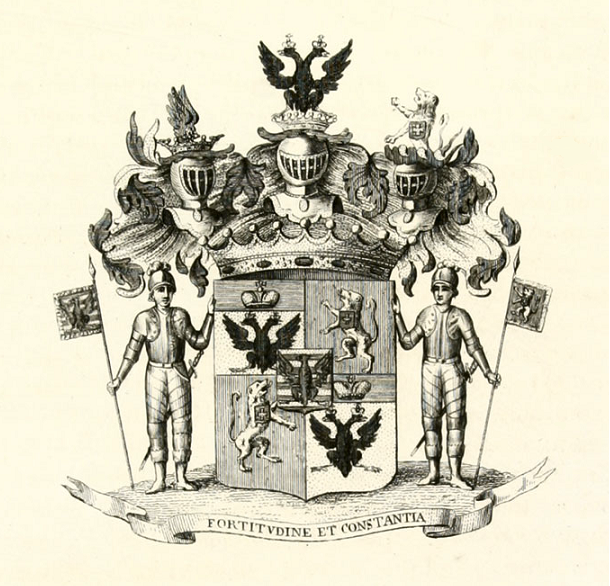 Герб рода графов Орловых